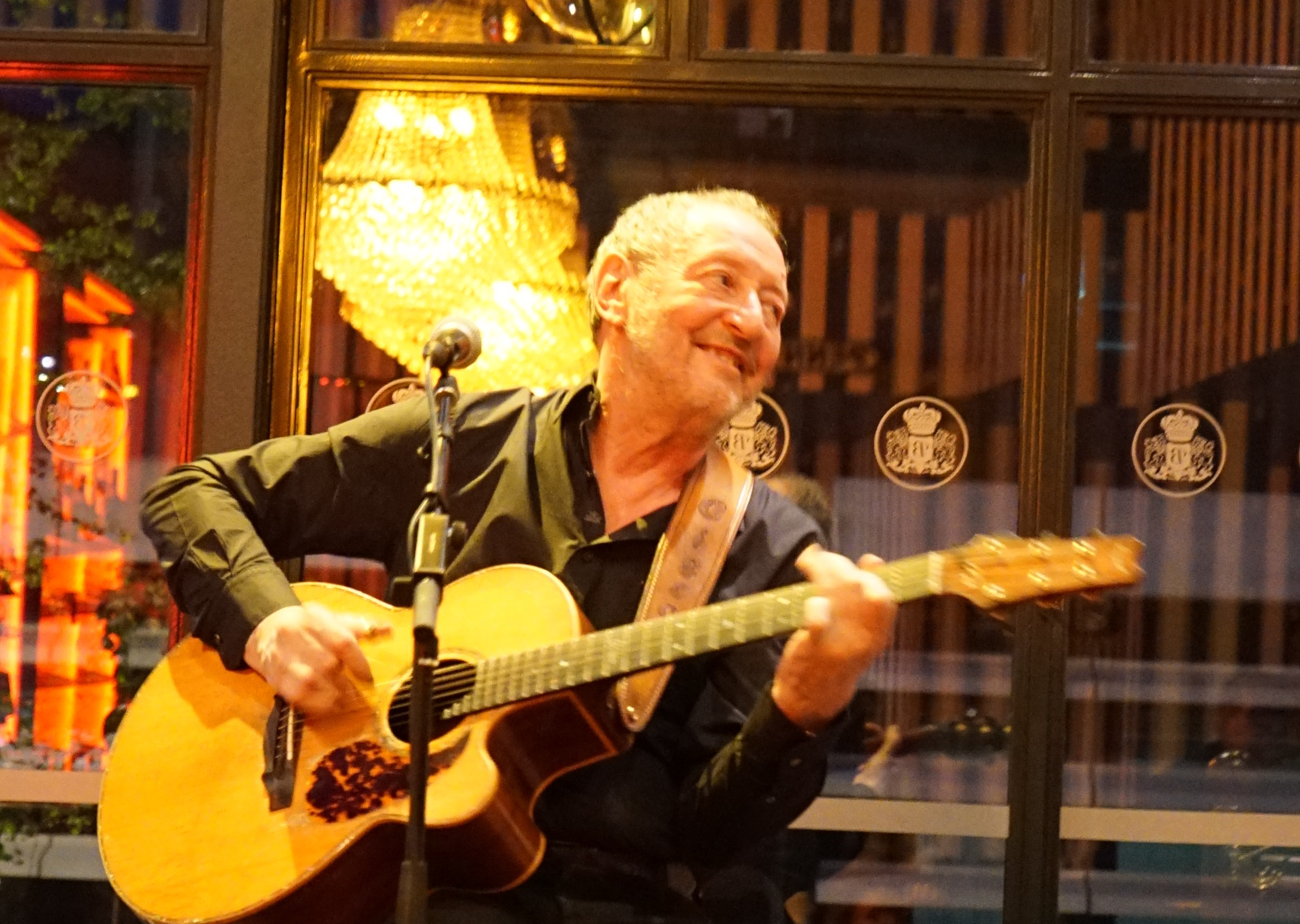 le batiment La Cartonnerie.